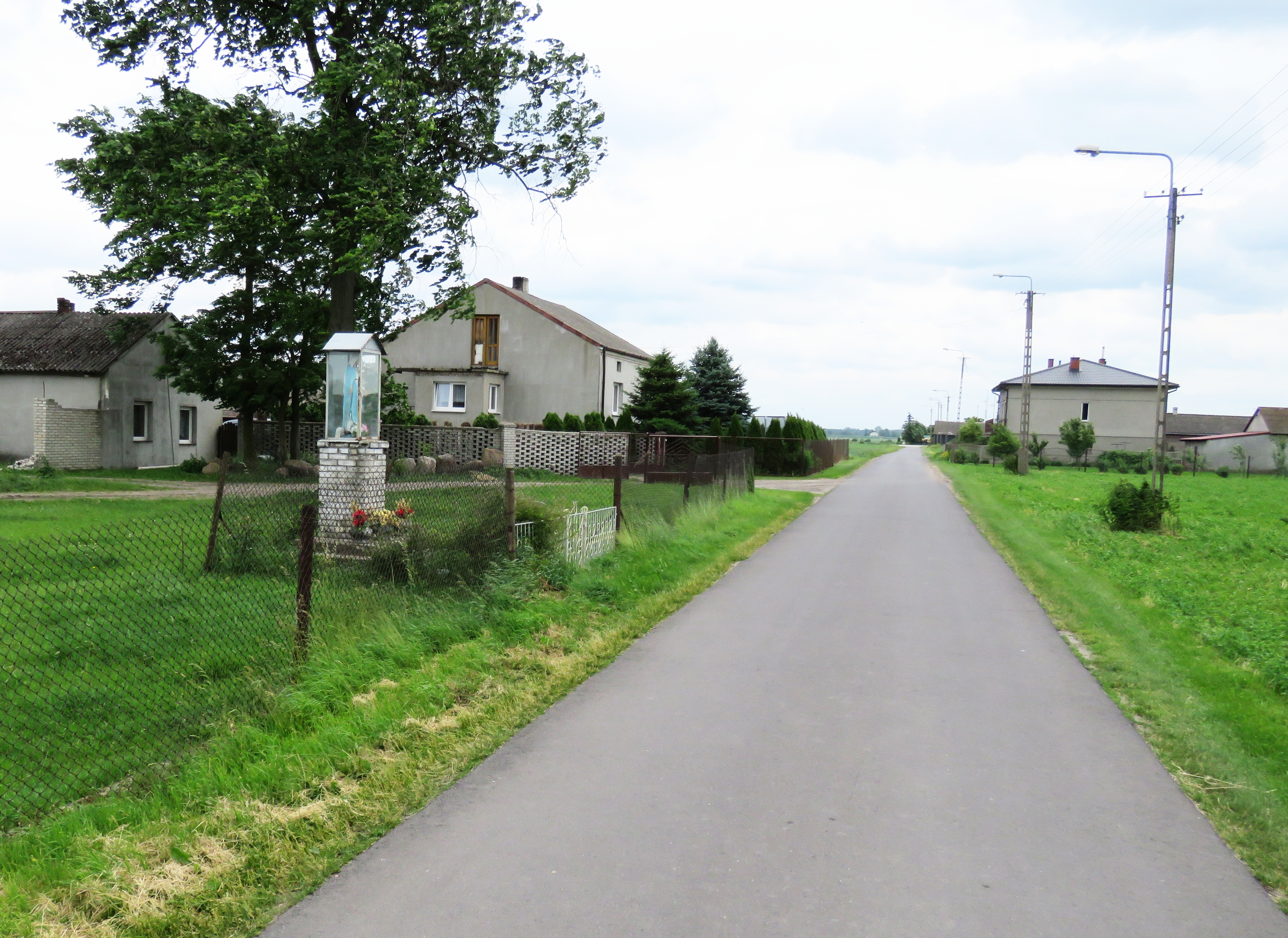 Nowy Oryszew